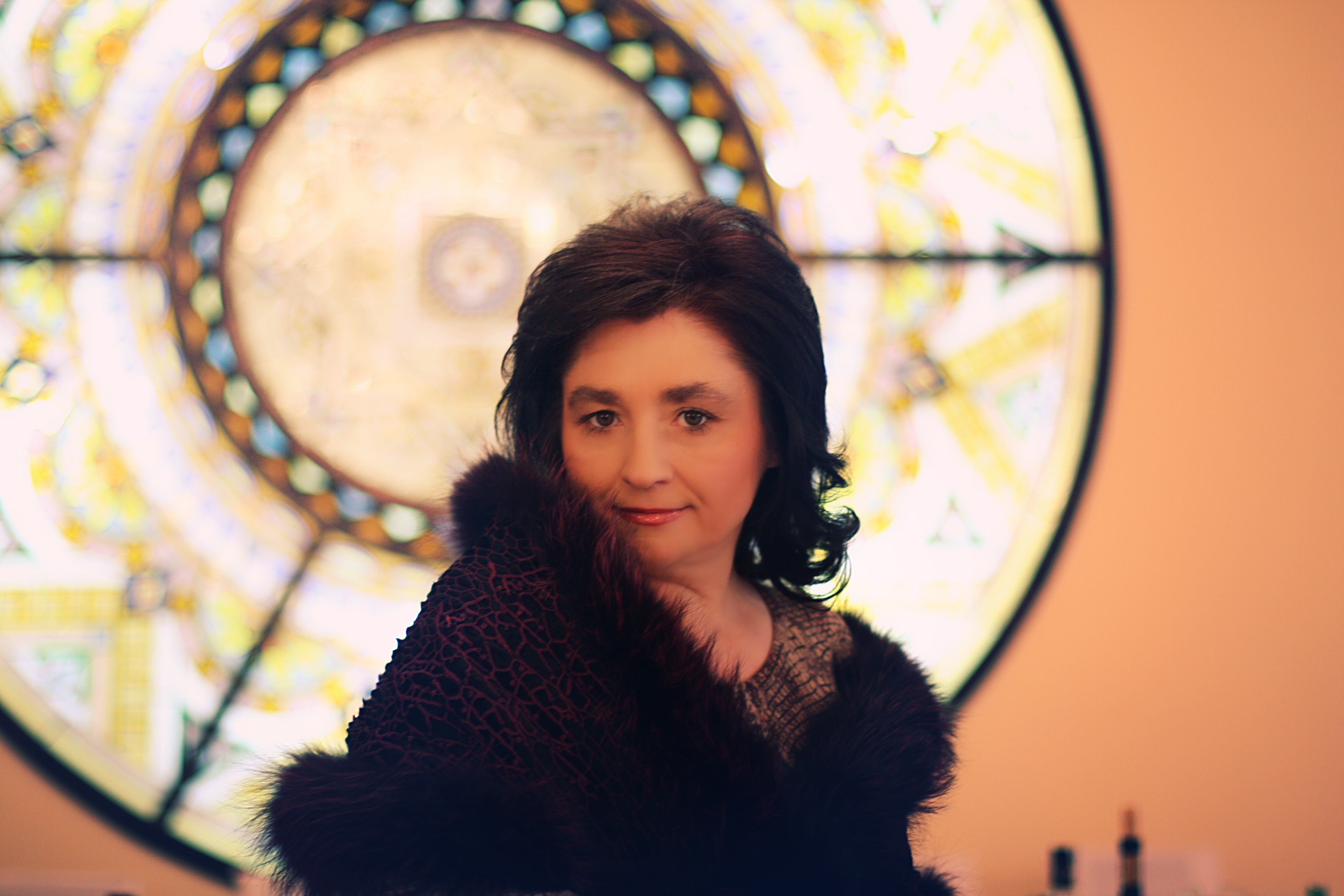 Mariya_Matios